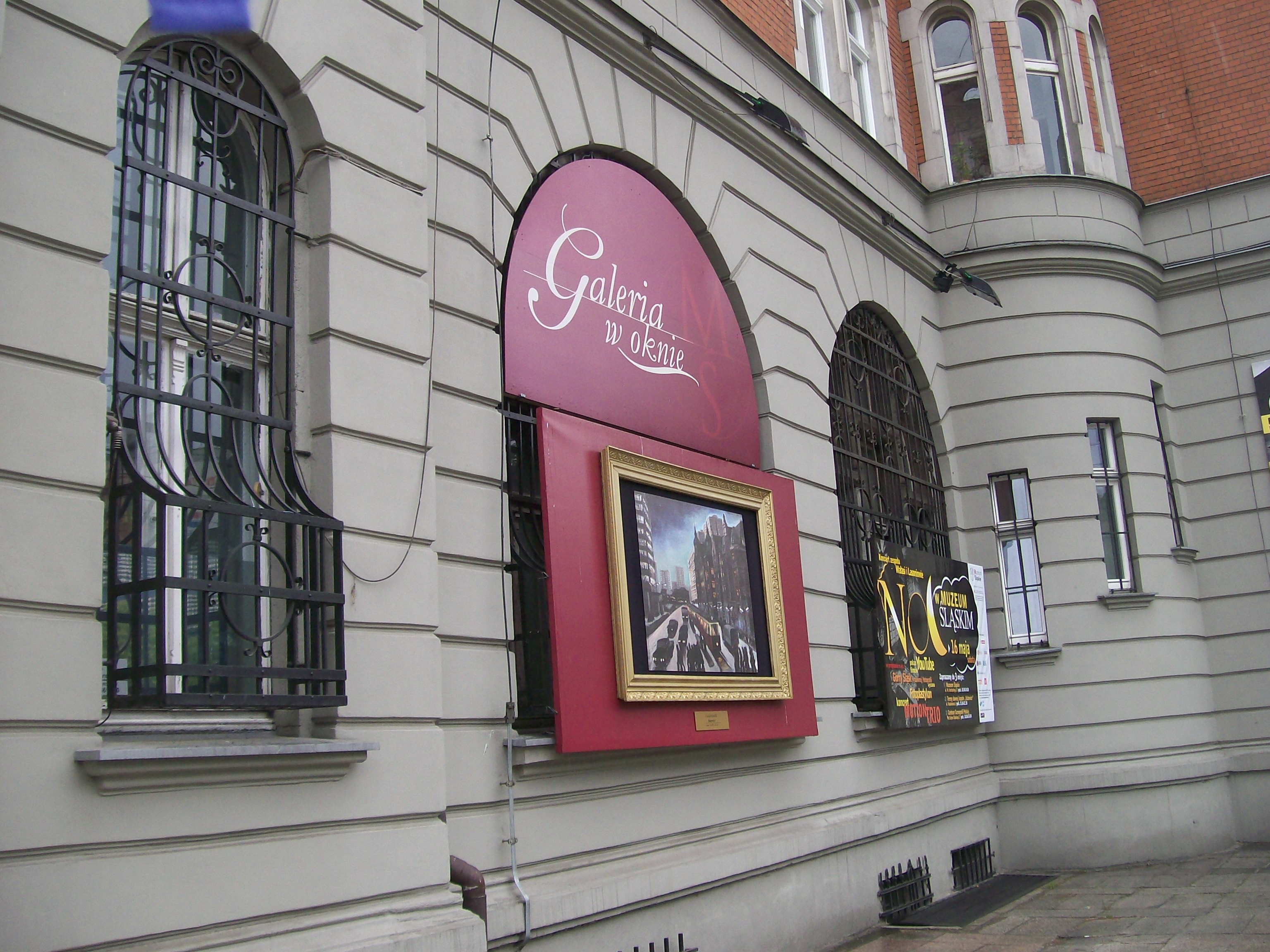 Noc w Muzeum Śląskim - „Galeria w oknie”: praca Ewalda Gawlika „Katowice” z poł. lat 80. XX w. (fasada budynku od strony al. W. Korfantego)